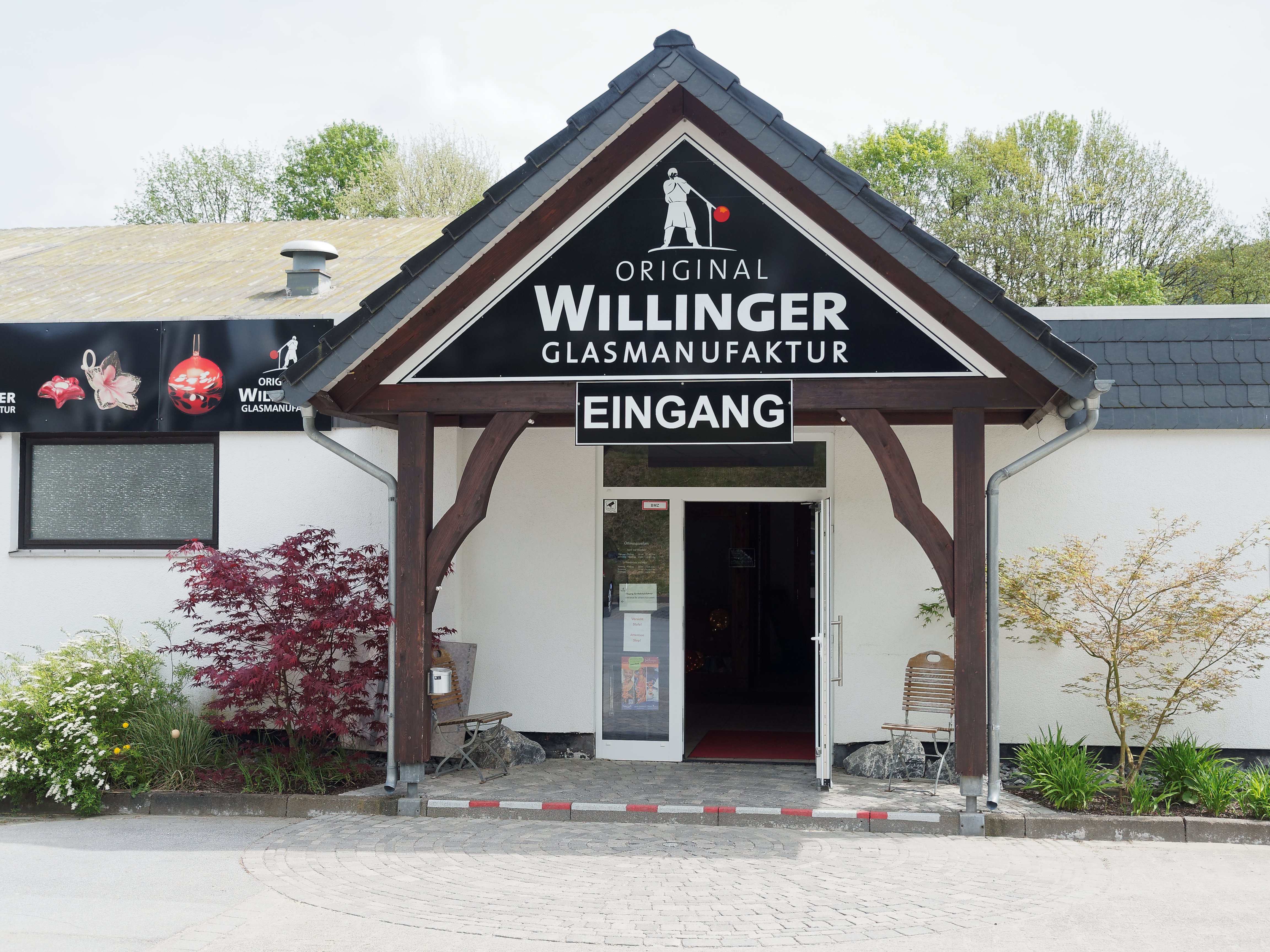 Eingang der Glasmanufaktur in Willingen, Hessen. Foto anlässlich des Wikipedia Sauerland-Stammtisches in Willingen